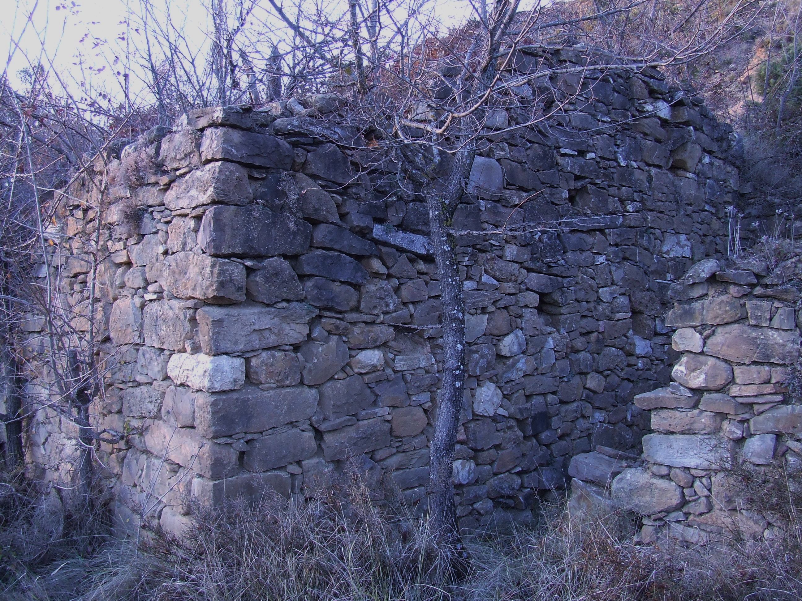 Cal Boixerol (Abella de la Conca, Pallars Jussà)